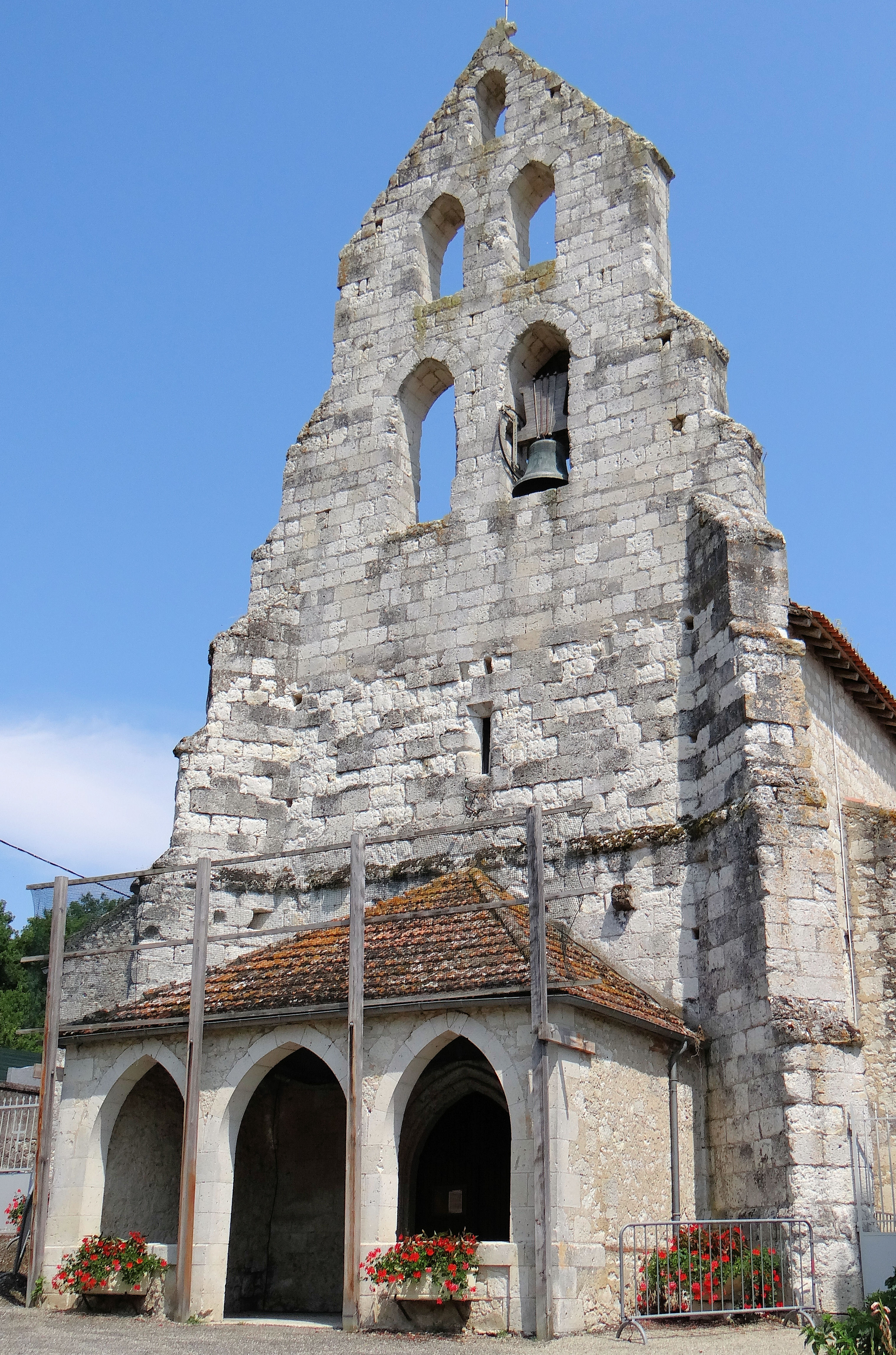 oudourville - Église Saint-Julien-de-Brioude - Clocher